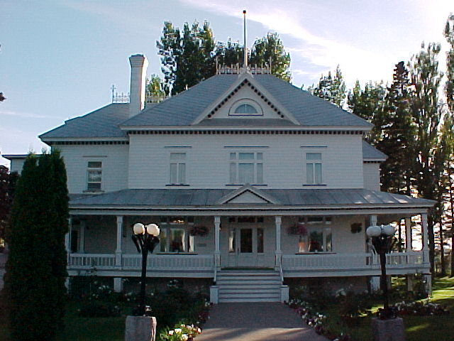 Prestytere de Price